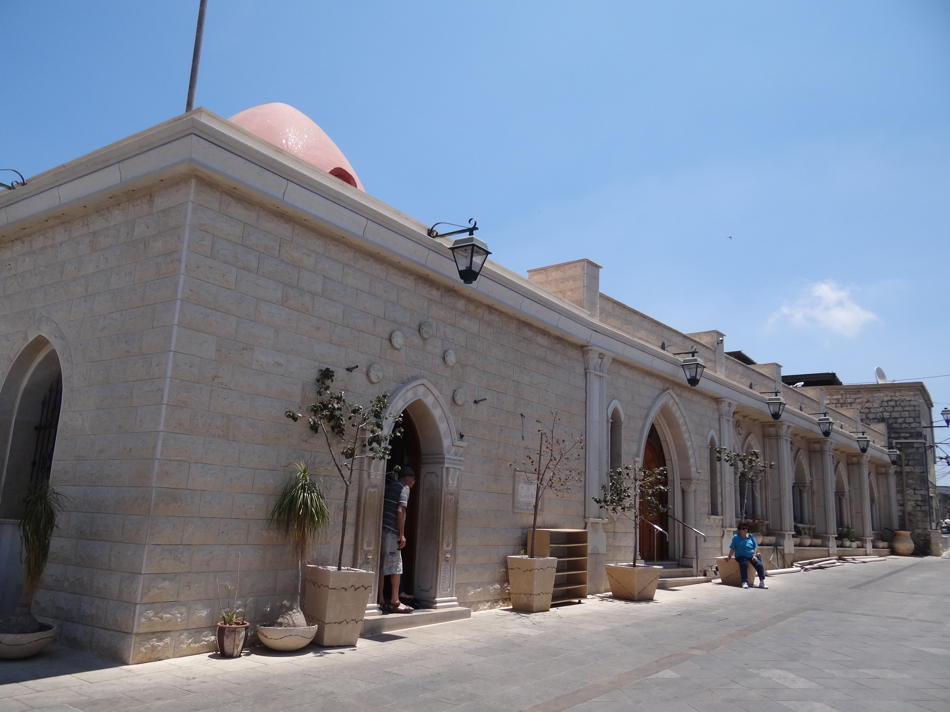 מקאם הנביא אבו אברהים (מקאם=אתר), הוא אתר דתי השוכן בדאלית אל-כרמל בשכונה המערבית לא רחוק מהמרכז הישן של היישוב